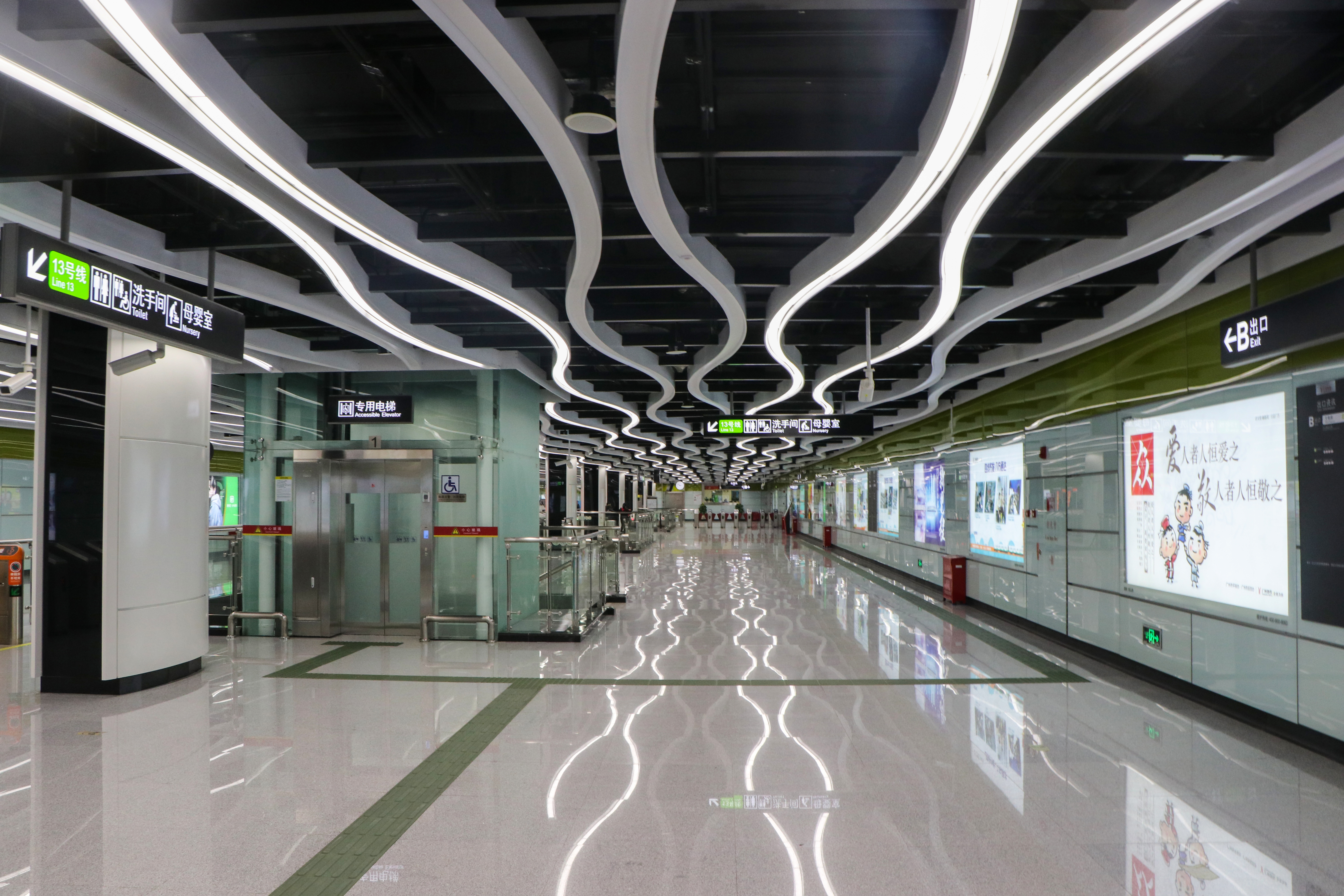 广州地铁双岗站